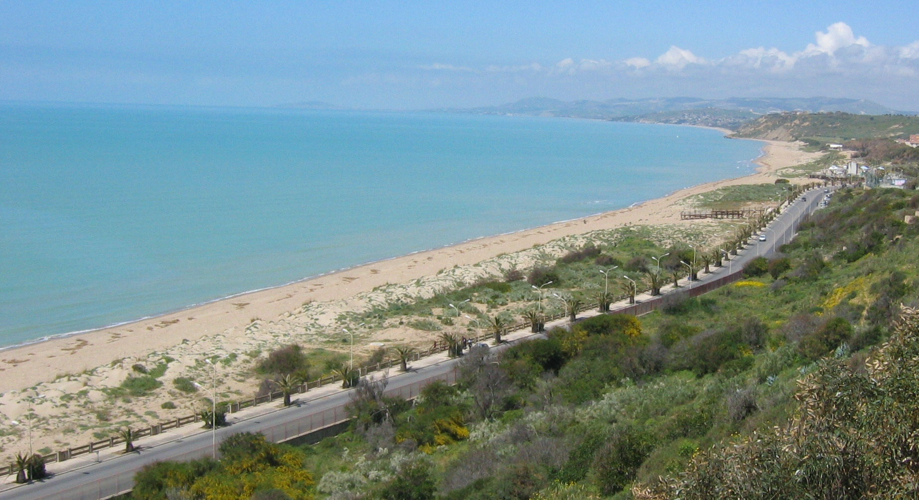 gela